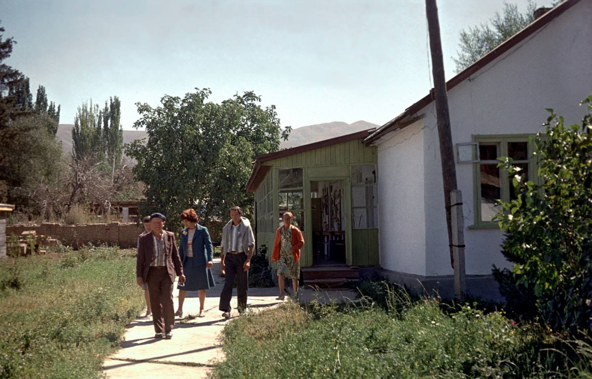 Забиров Рашид Джамалиевич, Бондарев Лев Георгиевич, Бондарева Валентина Яковлевна, Криницкая Римма Романовна и др. в Покровке